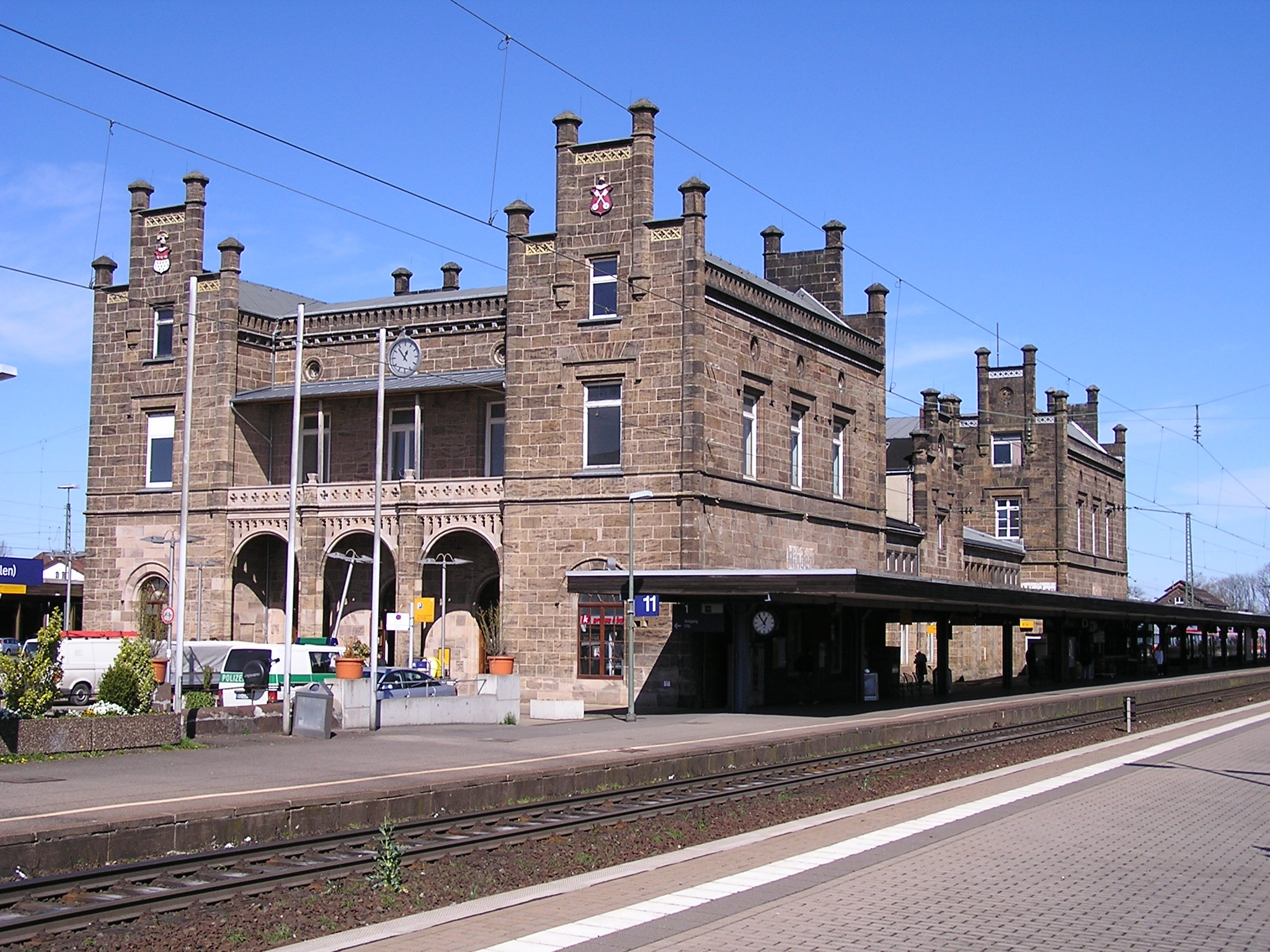 Der Bahnhof Minden (Westf.) in Minden, Nordrhein-Westfalen. Der Bahnhof war einst Endpunkt der Stammstrecke (heute Abschnitt Hamm-Minden der Köln-Mindener Eisenbahn-Gesellschaft und fest in die Anlagen der preußischen Festung Minden integriert.